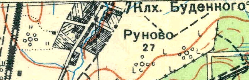 Топографическая карта Ленинградской области, квадрат О-36-13-В-в (Старо-Сиверская), деревня Руново